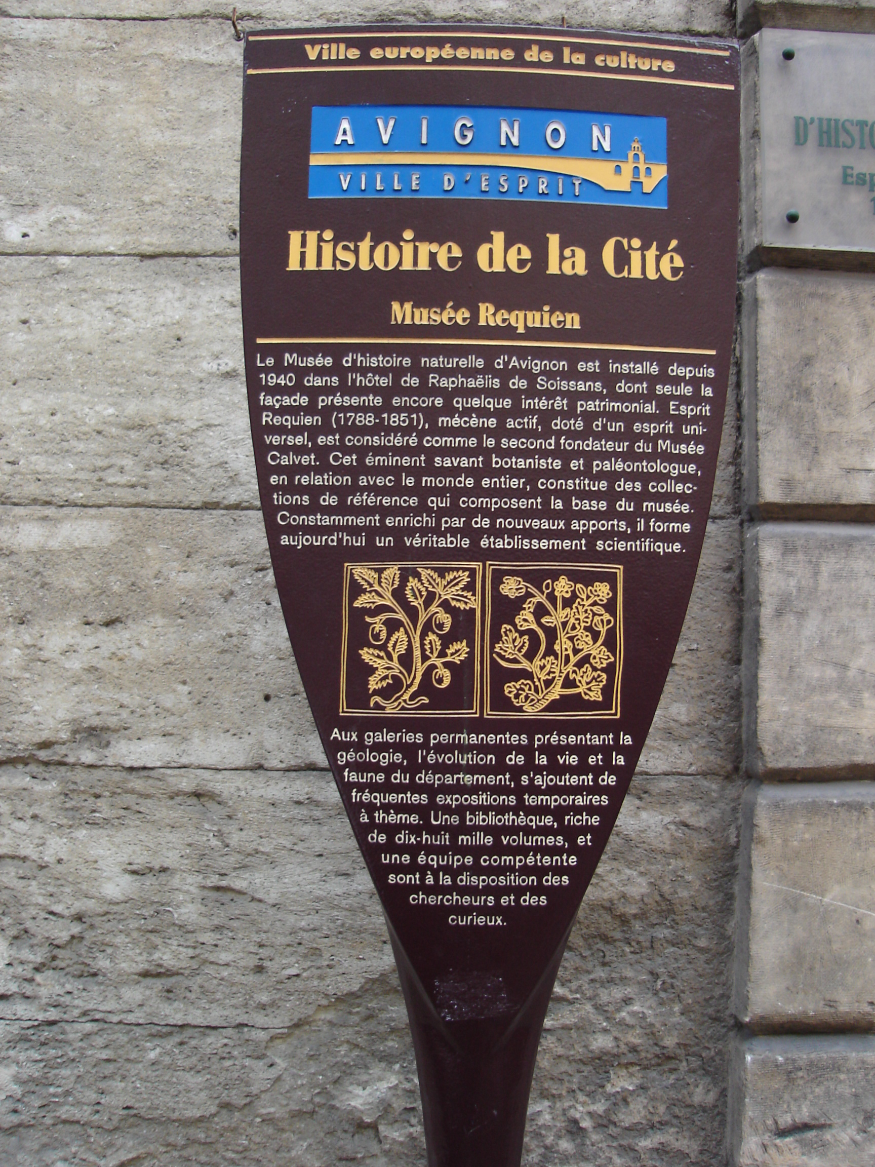 Plaque explicative du Musée Requien